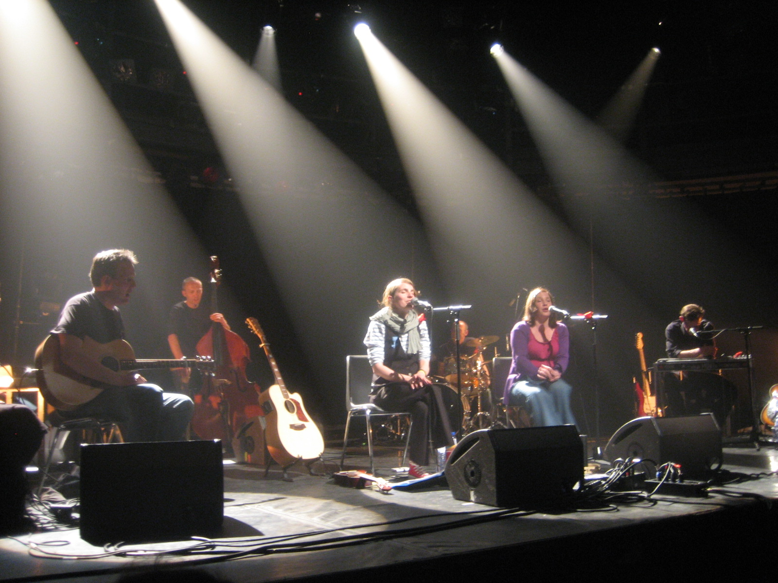 Sujet: D'Claudine Muno and The Luna Boots, am Botanique zu Bréissel, den 21. Abrëll 2010. Source/Auteur: Selwer geknipst vum User:Zinneke. Lizenz: CC-BY-SA